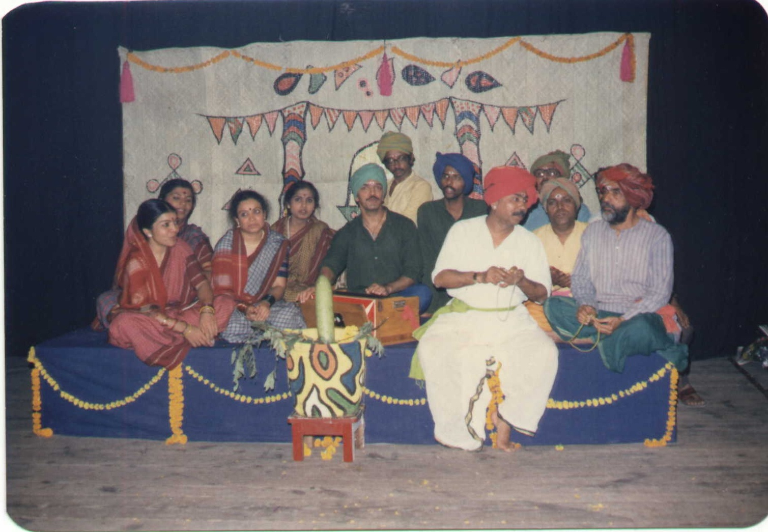 ಕನ್ನಡ: Kalpana Naganath in Kannada play `Jokumaraswami'- Show for Nandikar Festival at Calcutta with Dr. Chandrashekar Kambar and B.V Karanth.